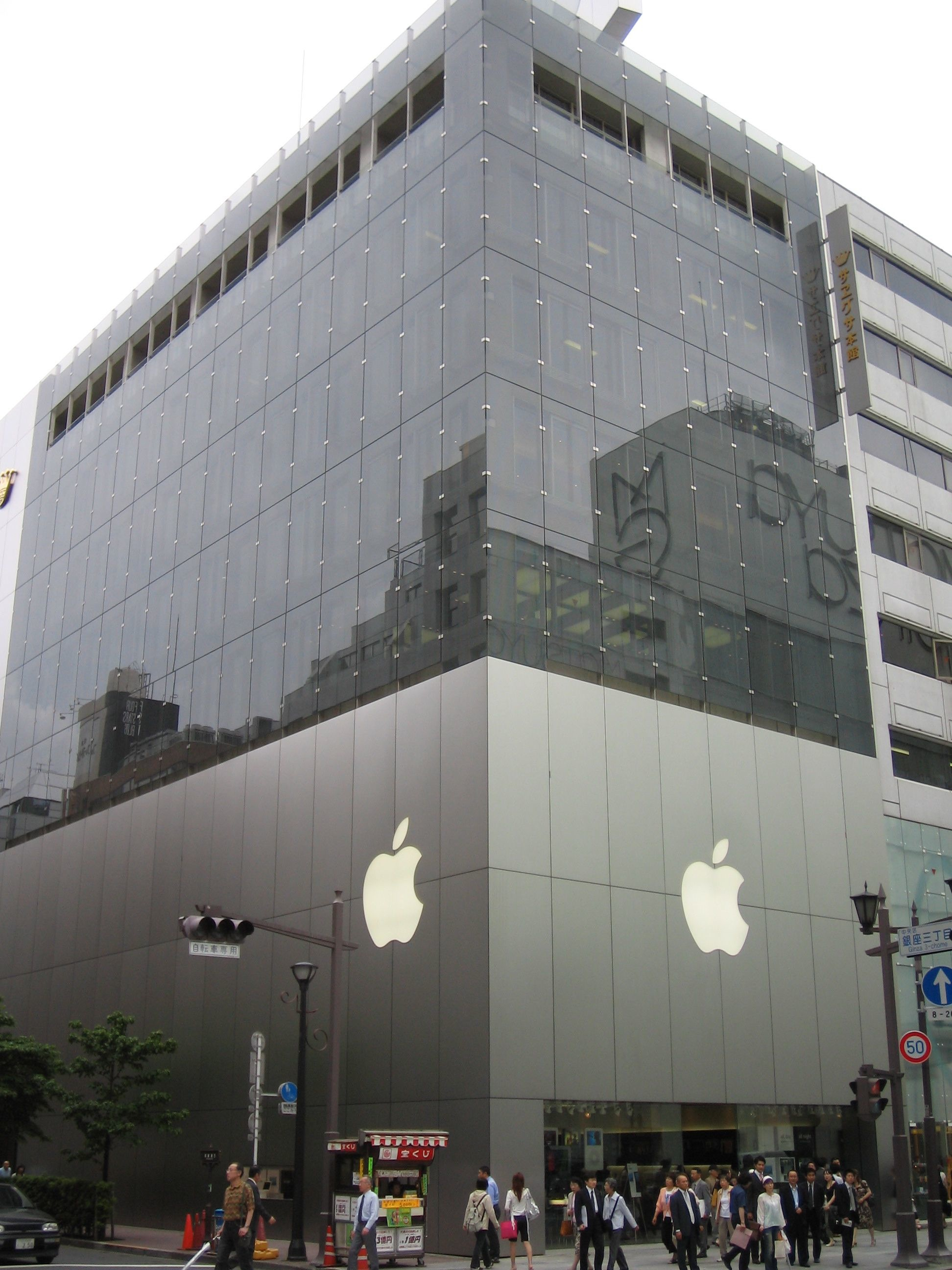 Ginza!